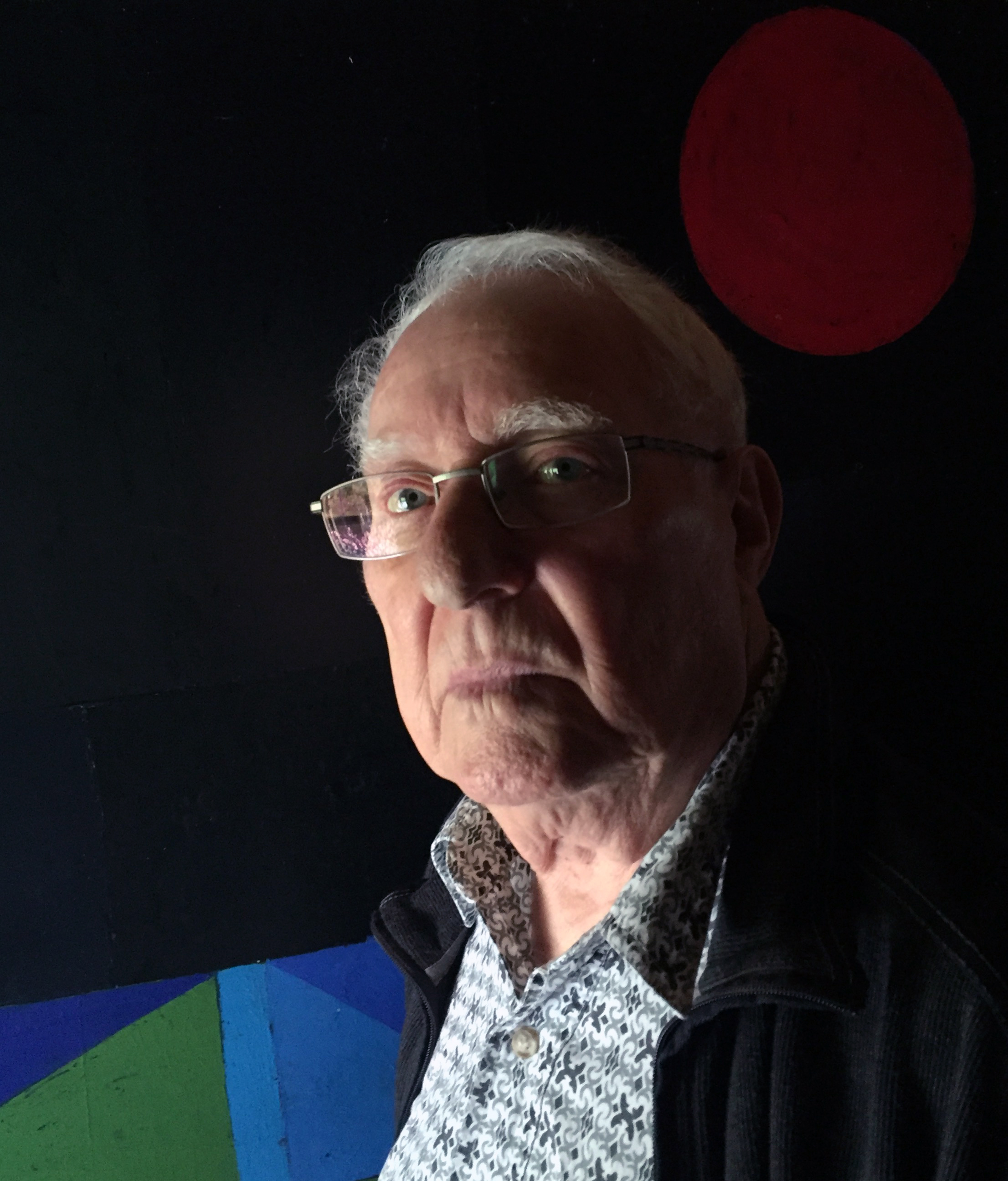 Portrait de l'auteur par son fils Laurent Voisard en 2016 dans sa résidence de Courtelevant.